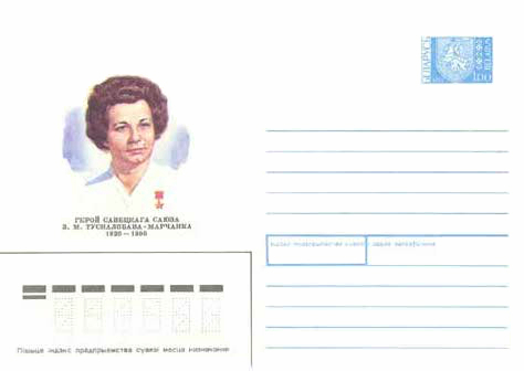 Почтовый конверт Беларуси - Туснолобова-Марченко Зинаида Михайловна